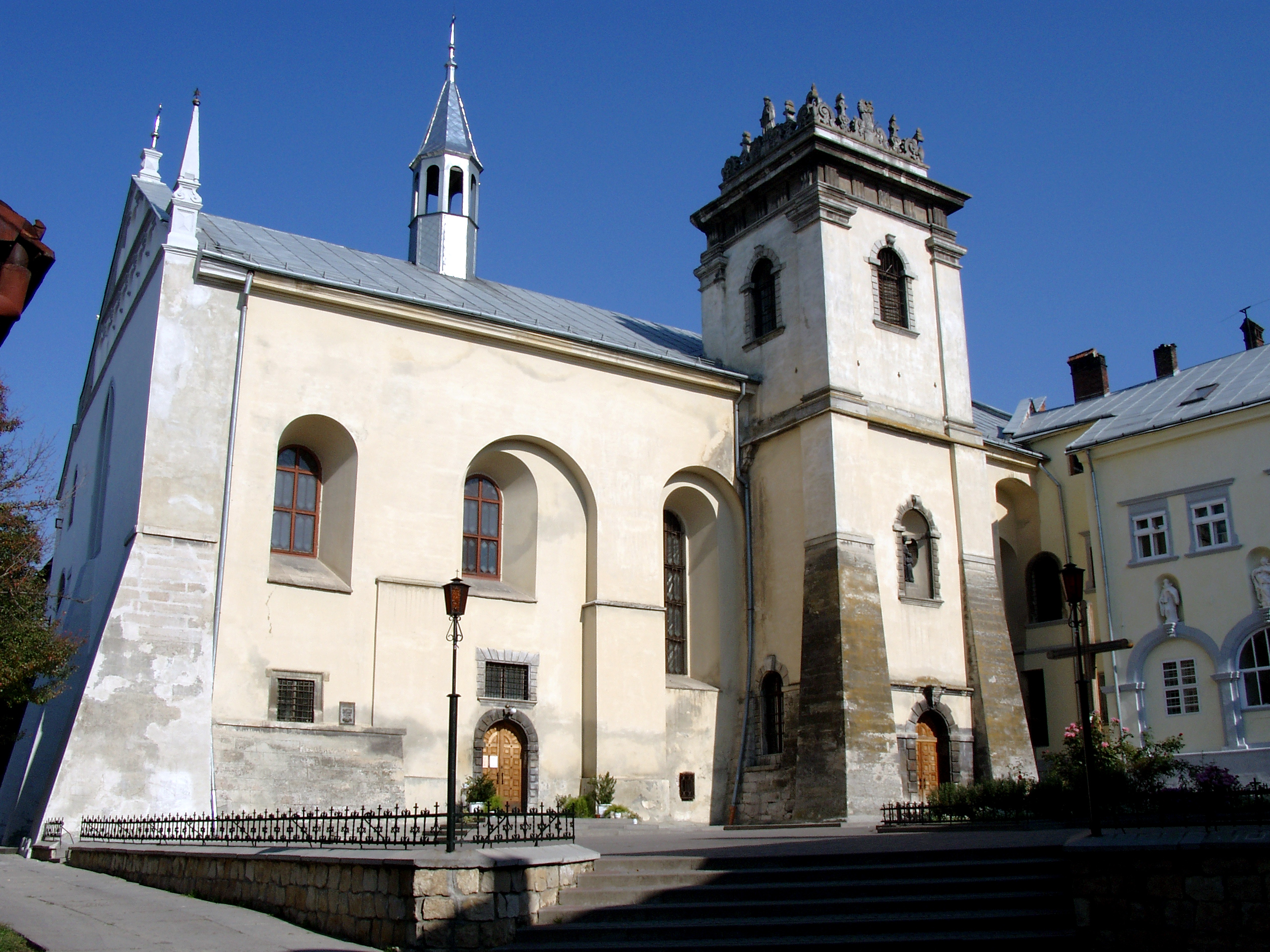 монастир Святопокровський бенедиктинок, Львів, Вічева, 2